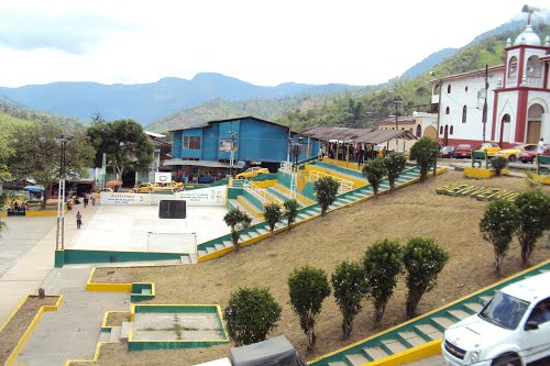 Nariño Ricaurte